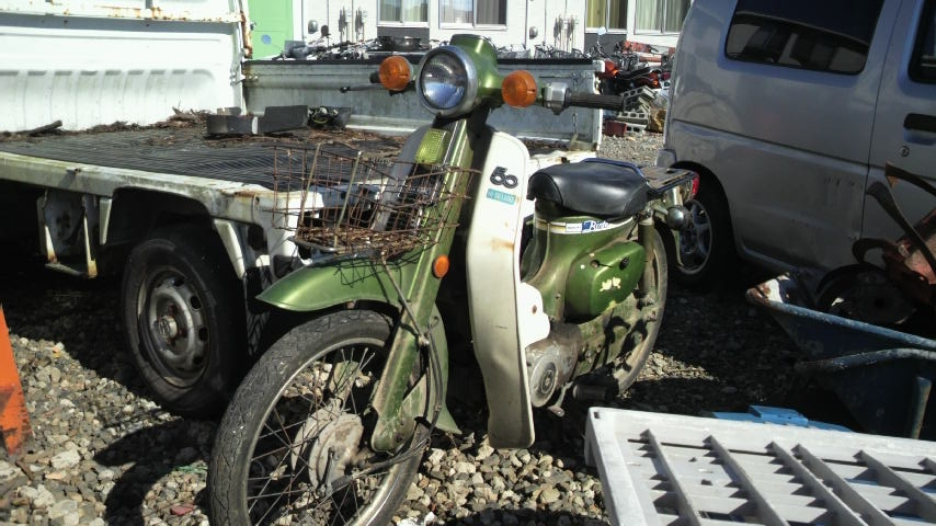 スズキバーディー（FR50-3型）